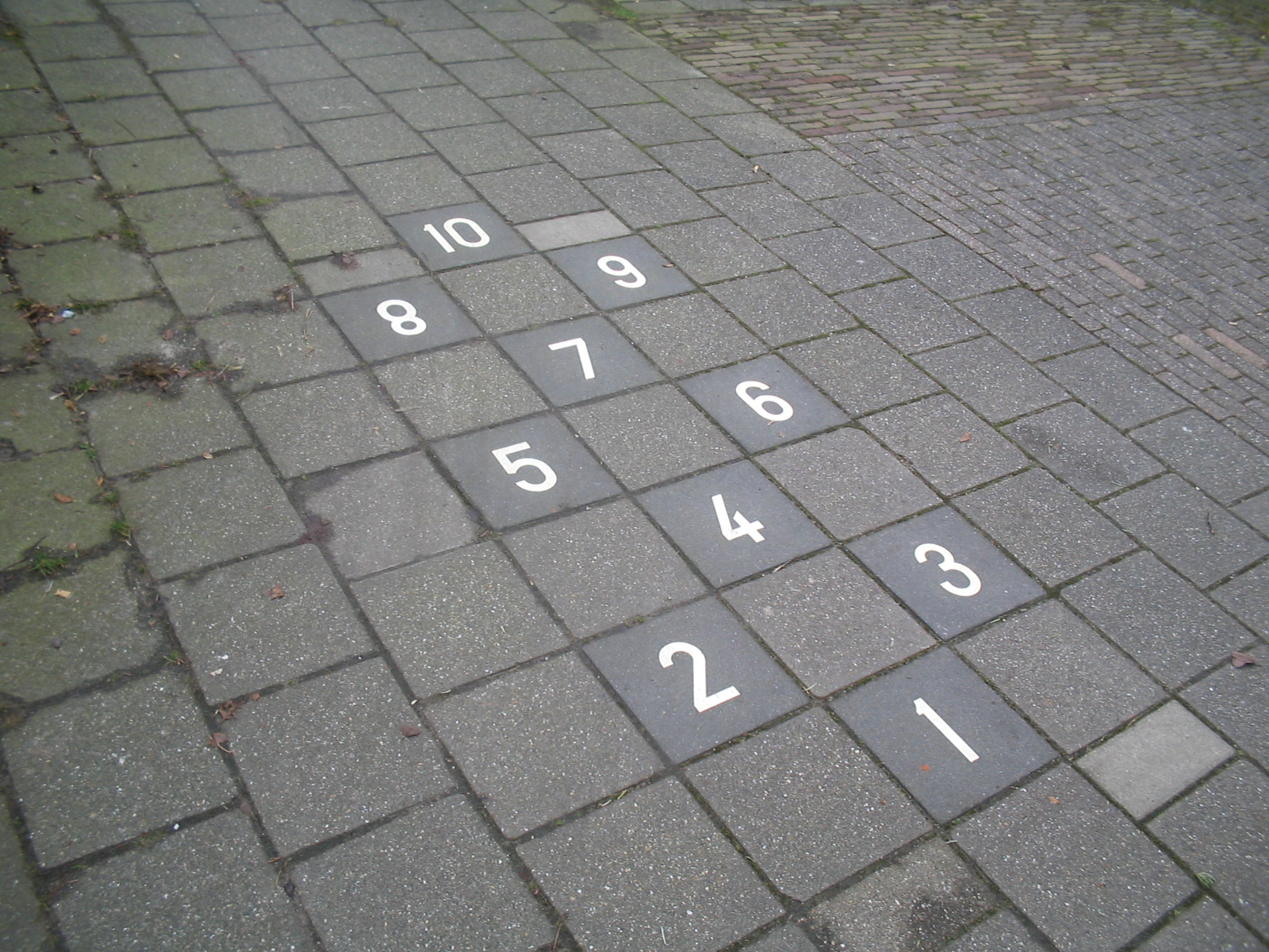 Hinkelbaan, Delft